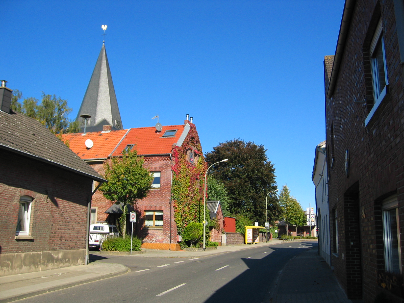 Würm, ehemalige Bürgermeisterei